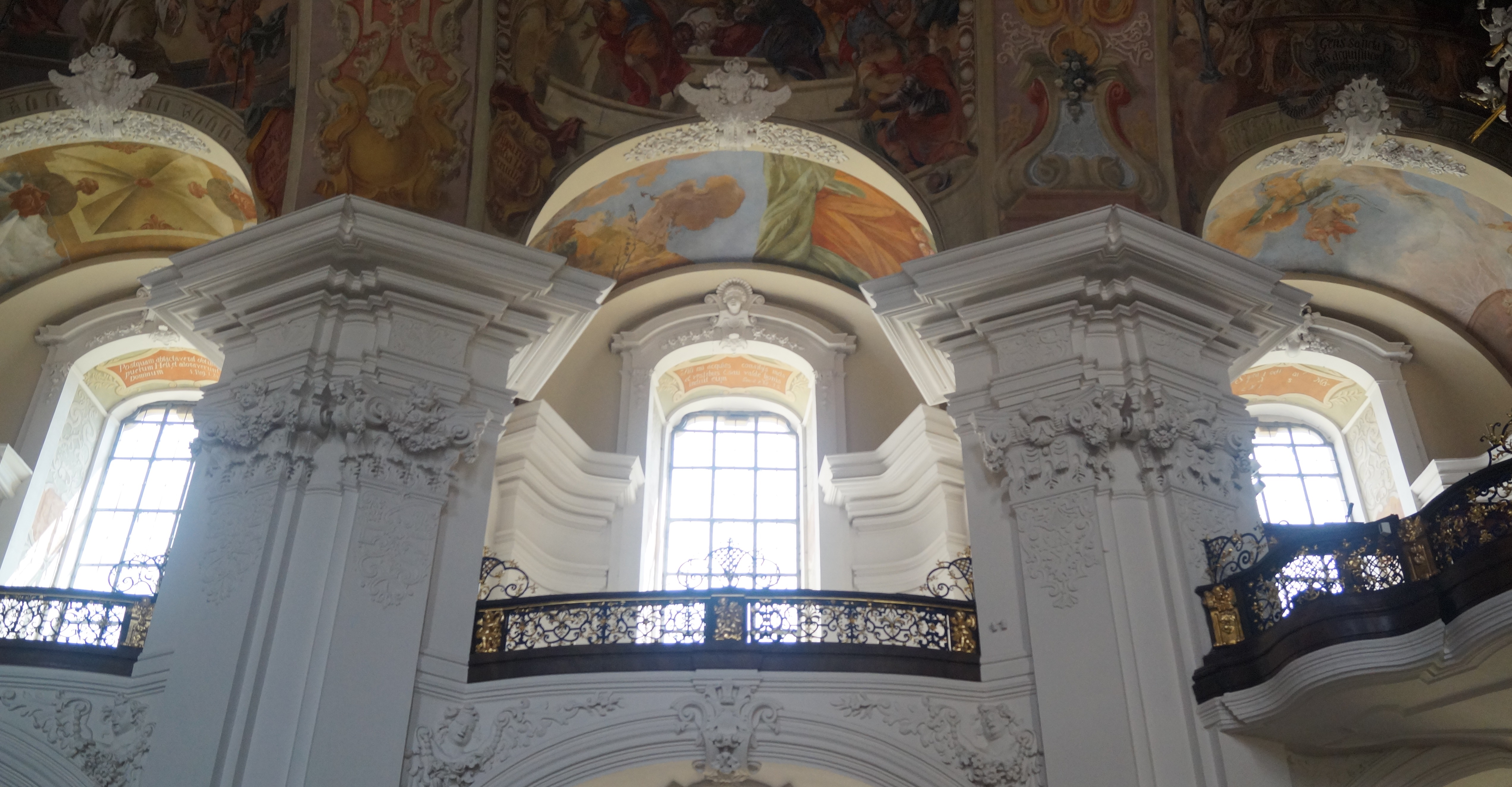 Kloster Grüssau - Emporen im Kirchenraum